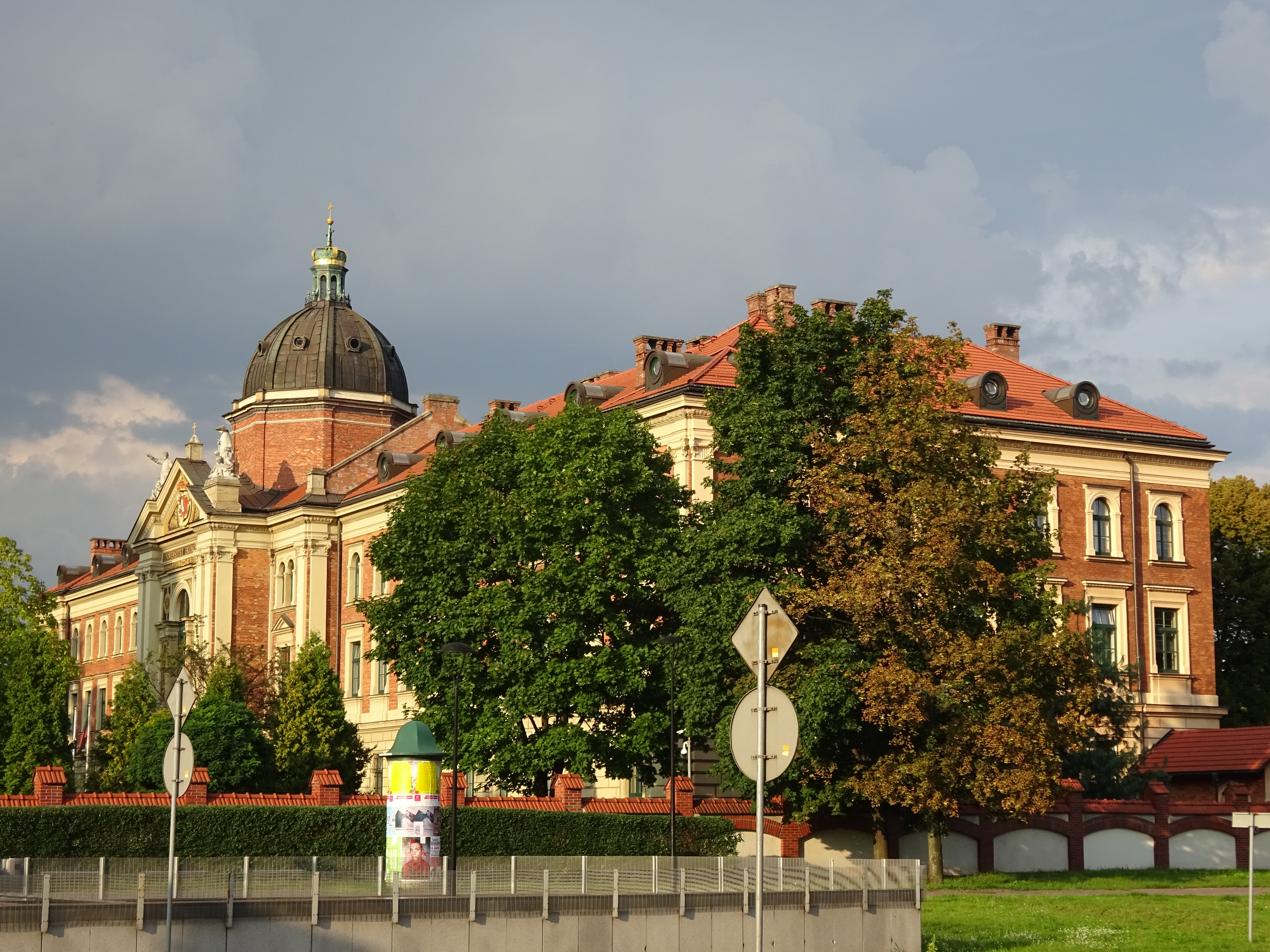 Gmach główny Uniwersytetu Ekonomicznego w Krakowie. Widok ze skrzyżowania ul. Lubomirskiego z ul. Rakowicką.